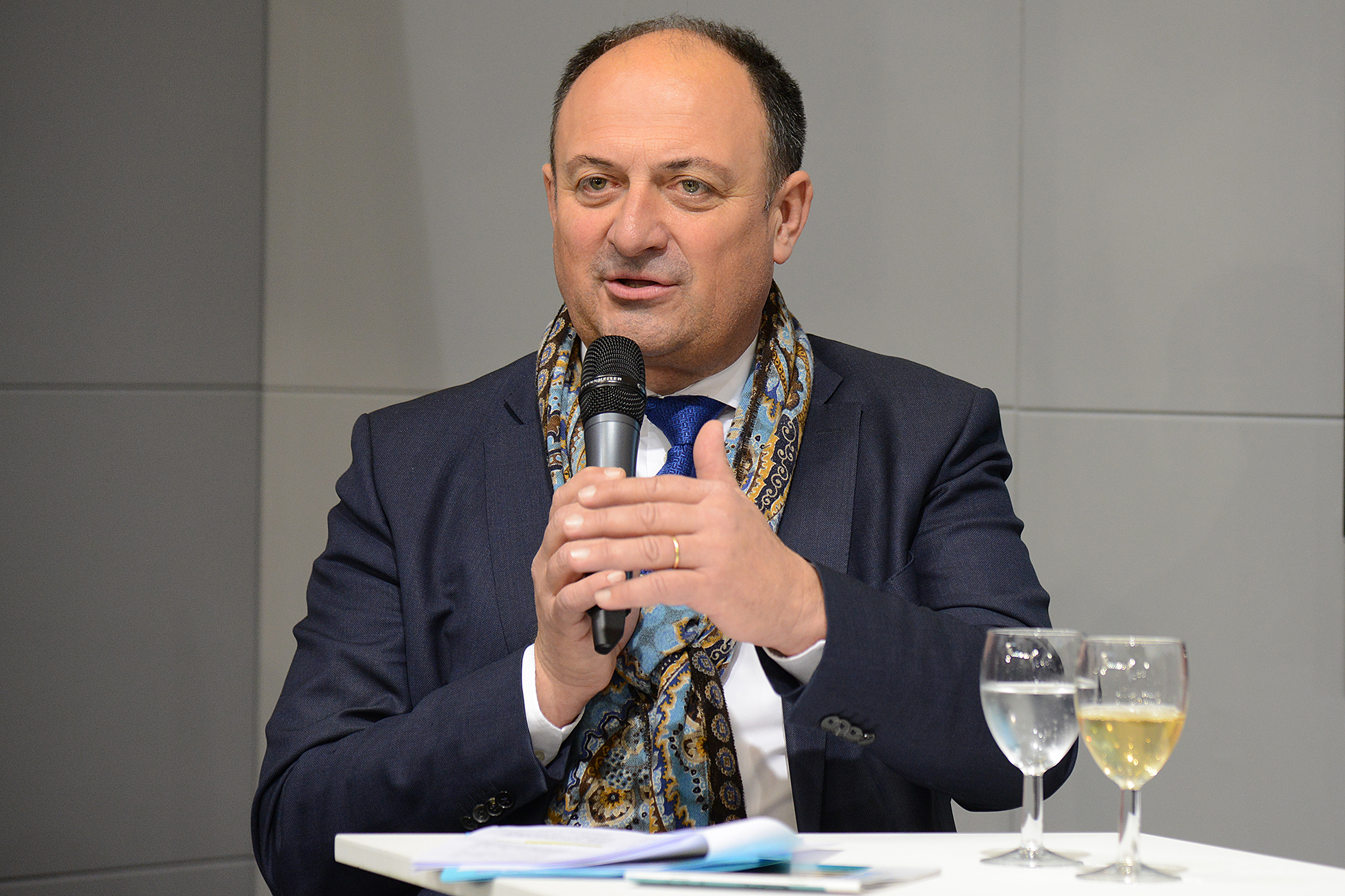 Willy Borsus au salon Agriflanders en 2017.